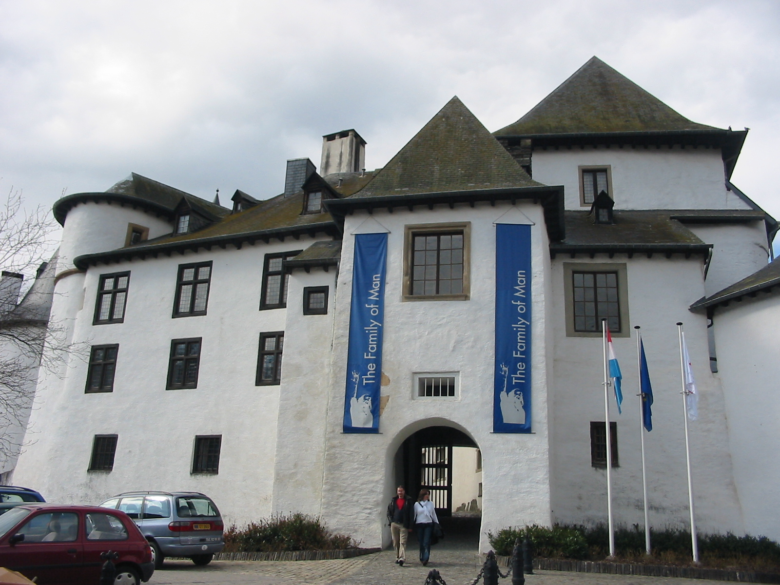 Luxembourg, Clervaux, Castle